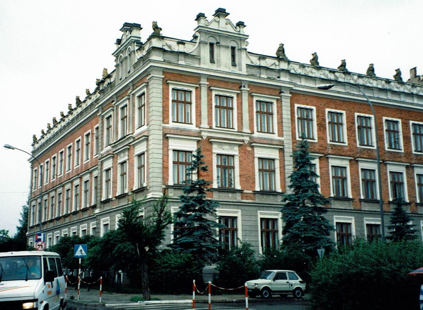 מבנה הגימנסיה בגורליצה, 1996